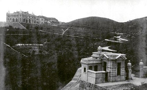 中文（香港）: 舊總督山頂別墅及守衛室（約1900年代）。